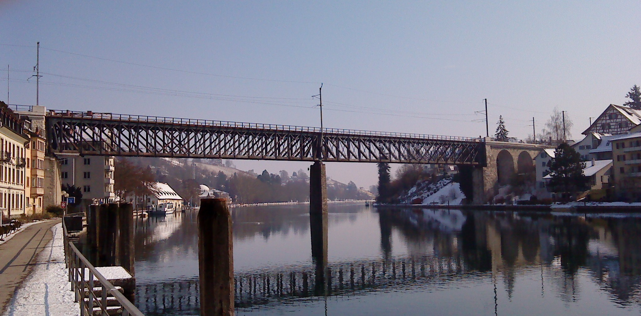 Eisenbahnbrücke der Seelinie bei Schaffhausen/CH (links Schaffhausen, rechts Feuerthalen)